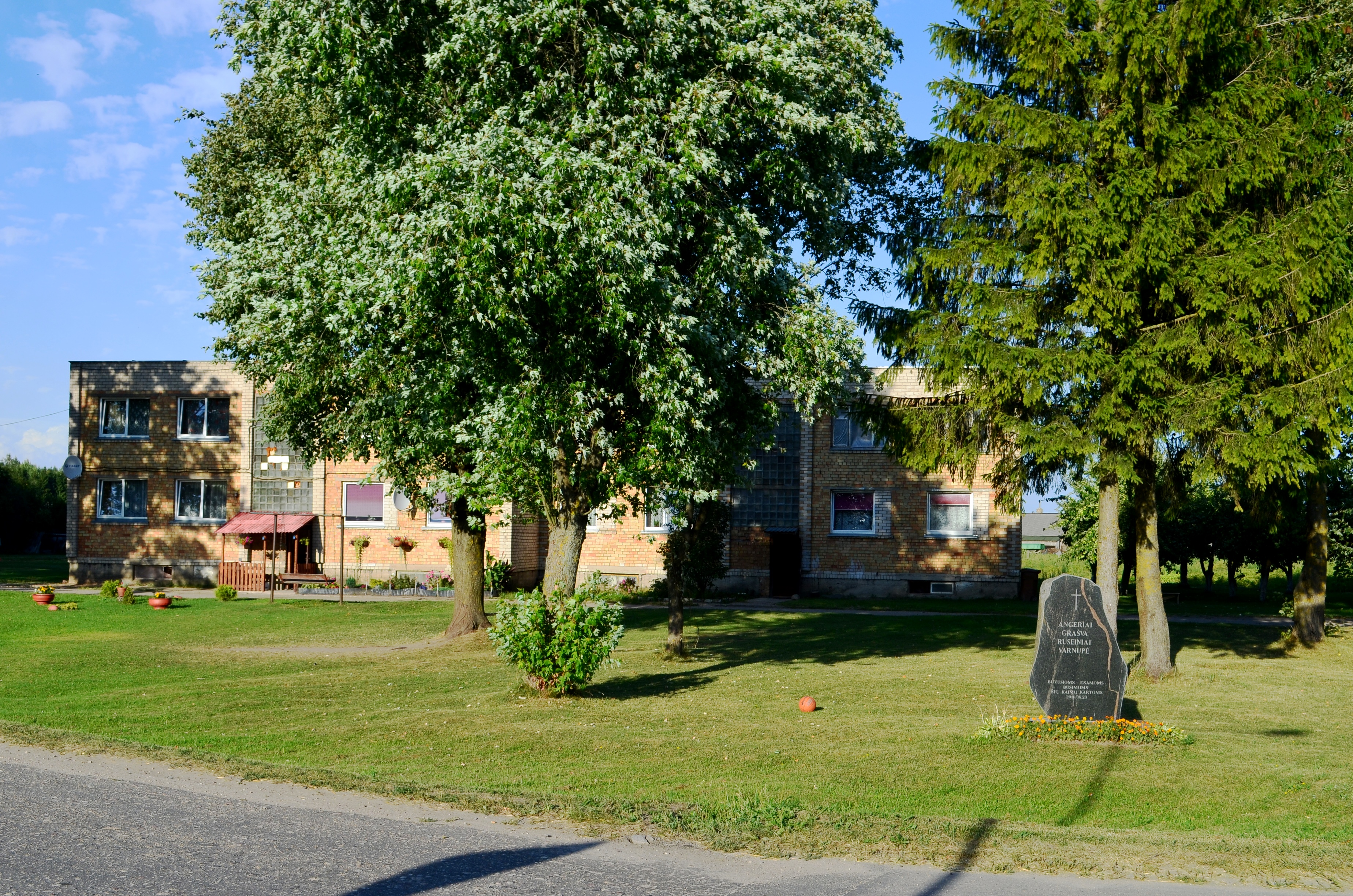 Angiriai, Kėdainių r.